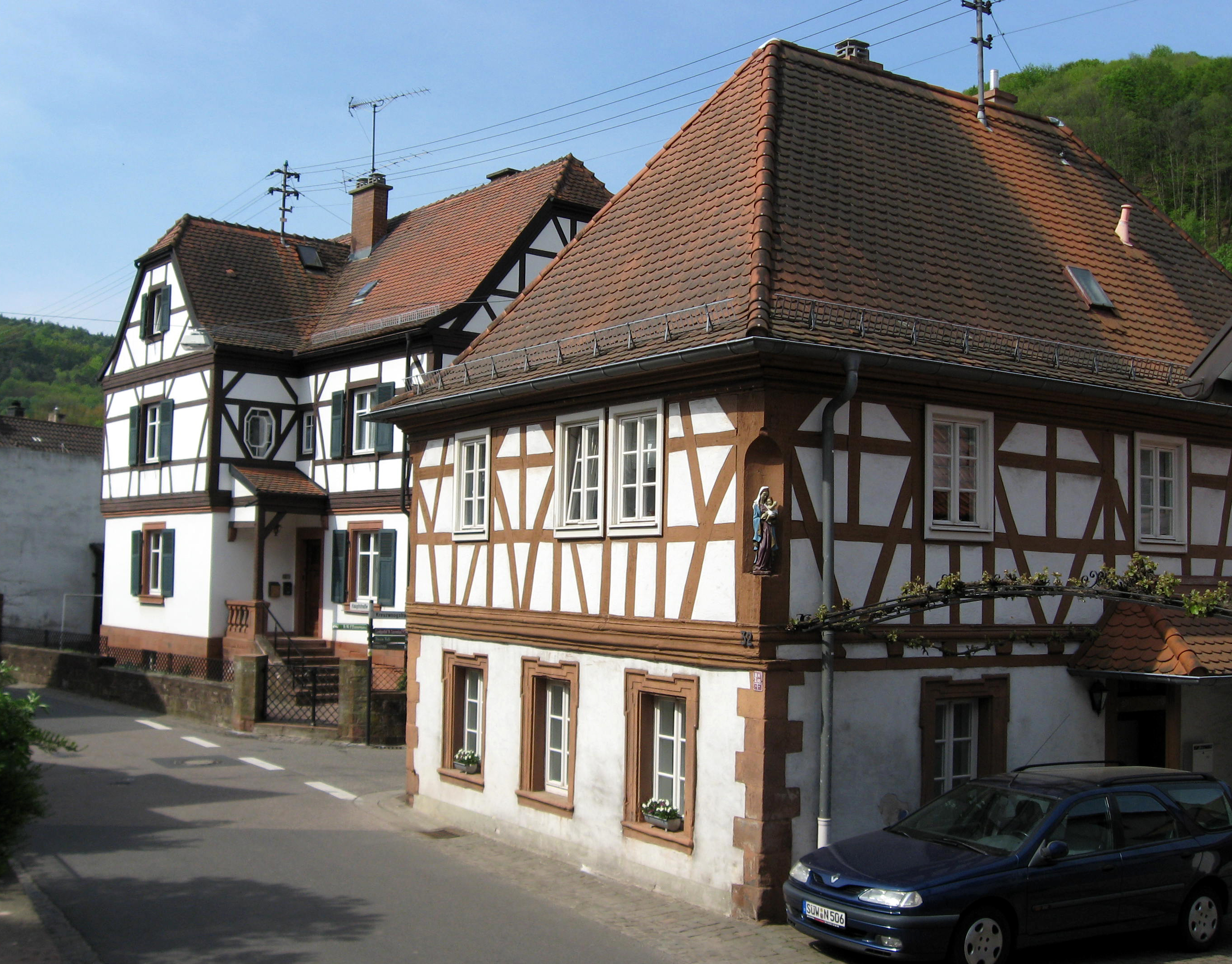 Fachwerkhaus Hauptstraße 32, links mit geschwelltem Eckpfeiler, rechts Heiligennische im Eckpfeiler, darin Maria mit Kind - im Hintergrund das ehem. Pfarrhaus, Hauptstr. 34